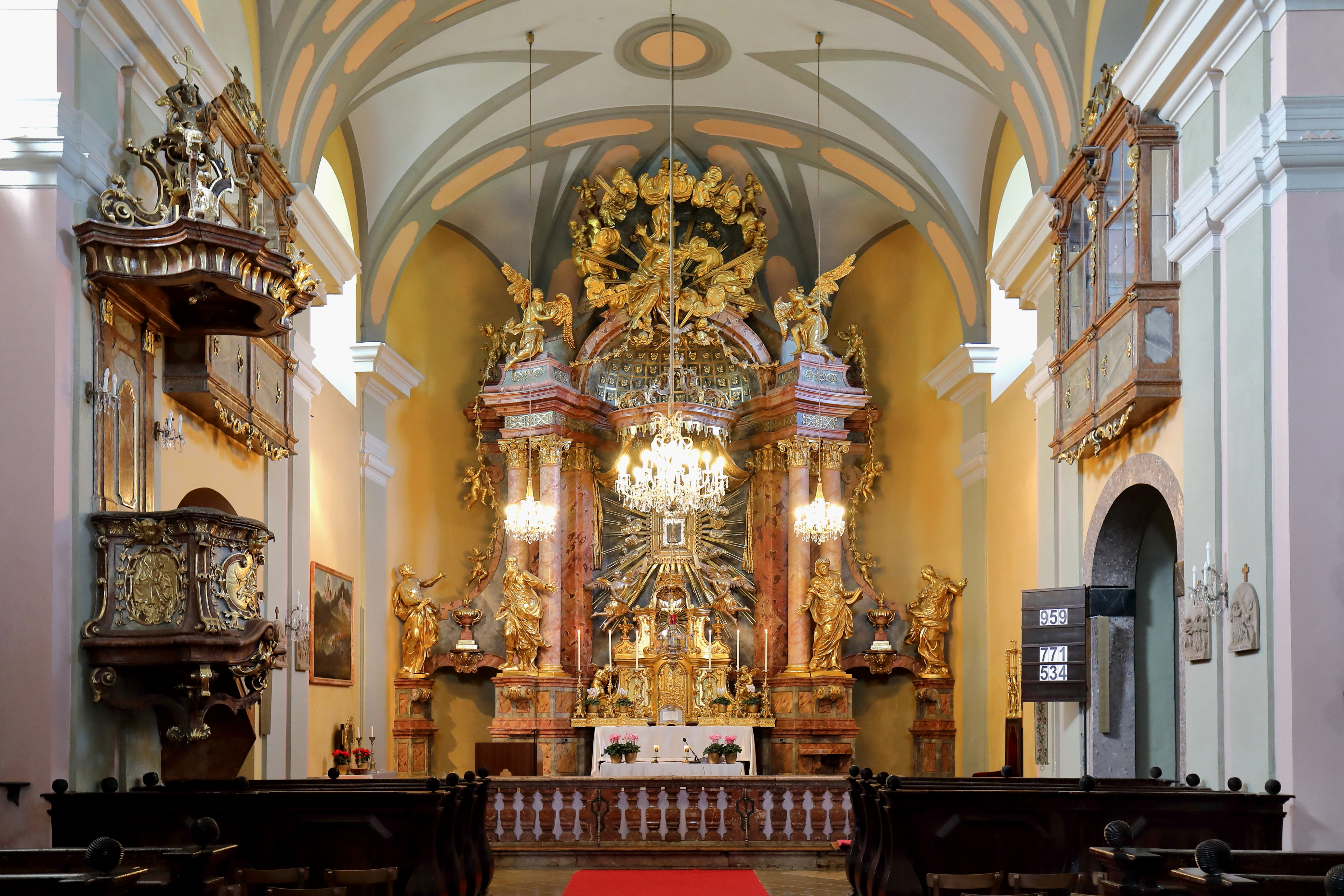 Hochaltar der Kloster- und Wallfahrtskirche Hilfreiche Jungfrau Maria in Mariahilfberg, ein Weiler und Wallfahrtsort in der niederösterreichischen Marktgemeinde Gutenstein.Die Kirche wurde anstelle einer 1705 abgebrannten Kirche in vergrößerter Form von 1710 bis 1721/24 neu aufgebaut. Der Hochaltar wurde 1720 errichtet und 1766/67 sowie 1803/10 ergänzt. Die Hängekanzel ist ebenfalls ein Werk aus dem Jahr 1720.